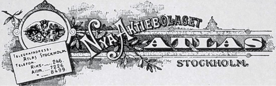 Atlasfabriken "Nya Aktiebolaget Atlas"